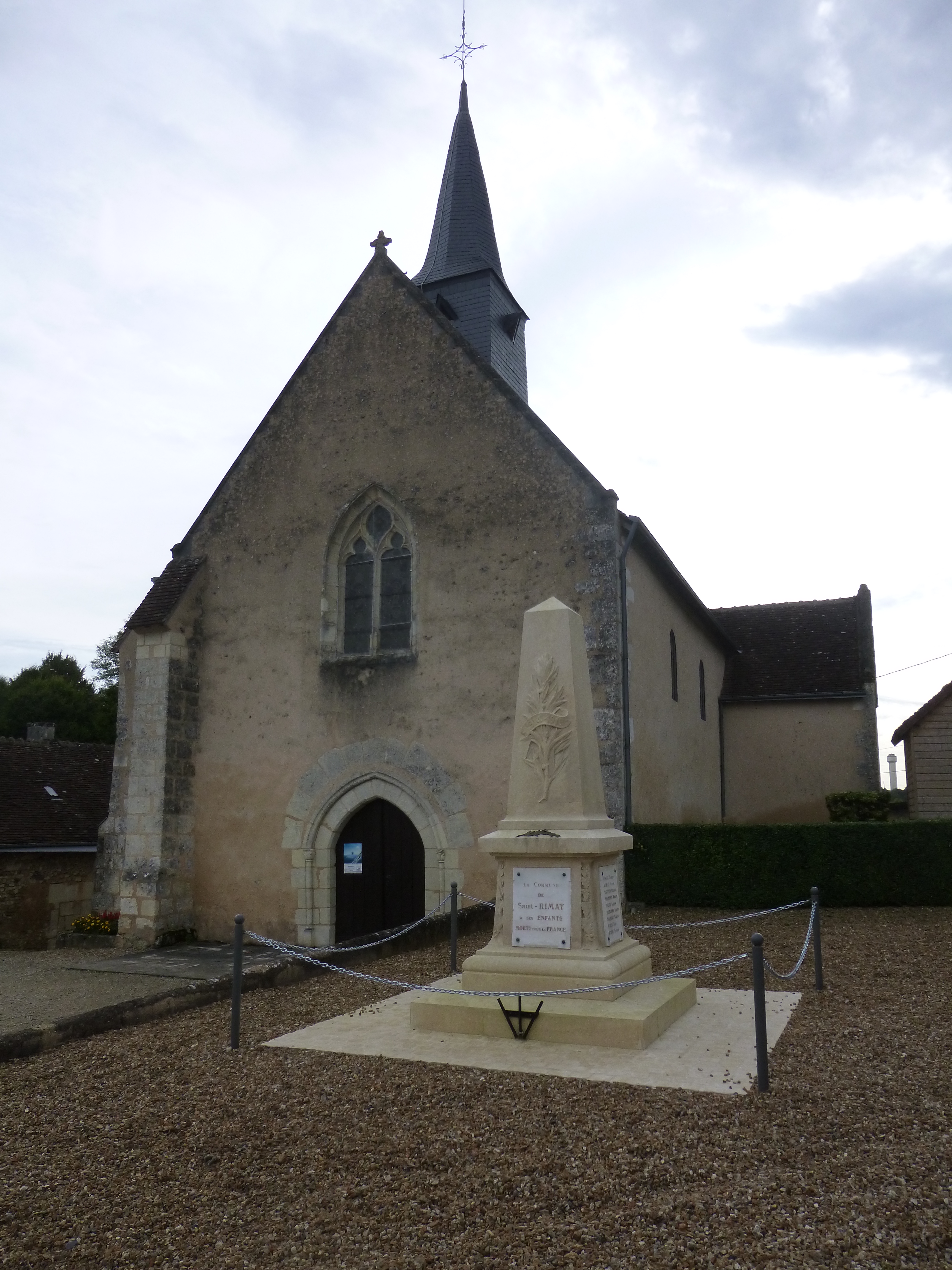 Vue extérieure de la façade de l'église de Saint-Rimay.